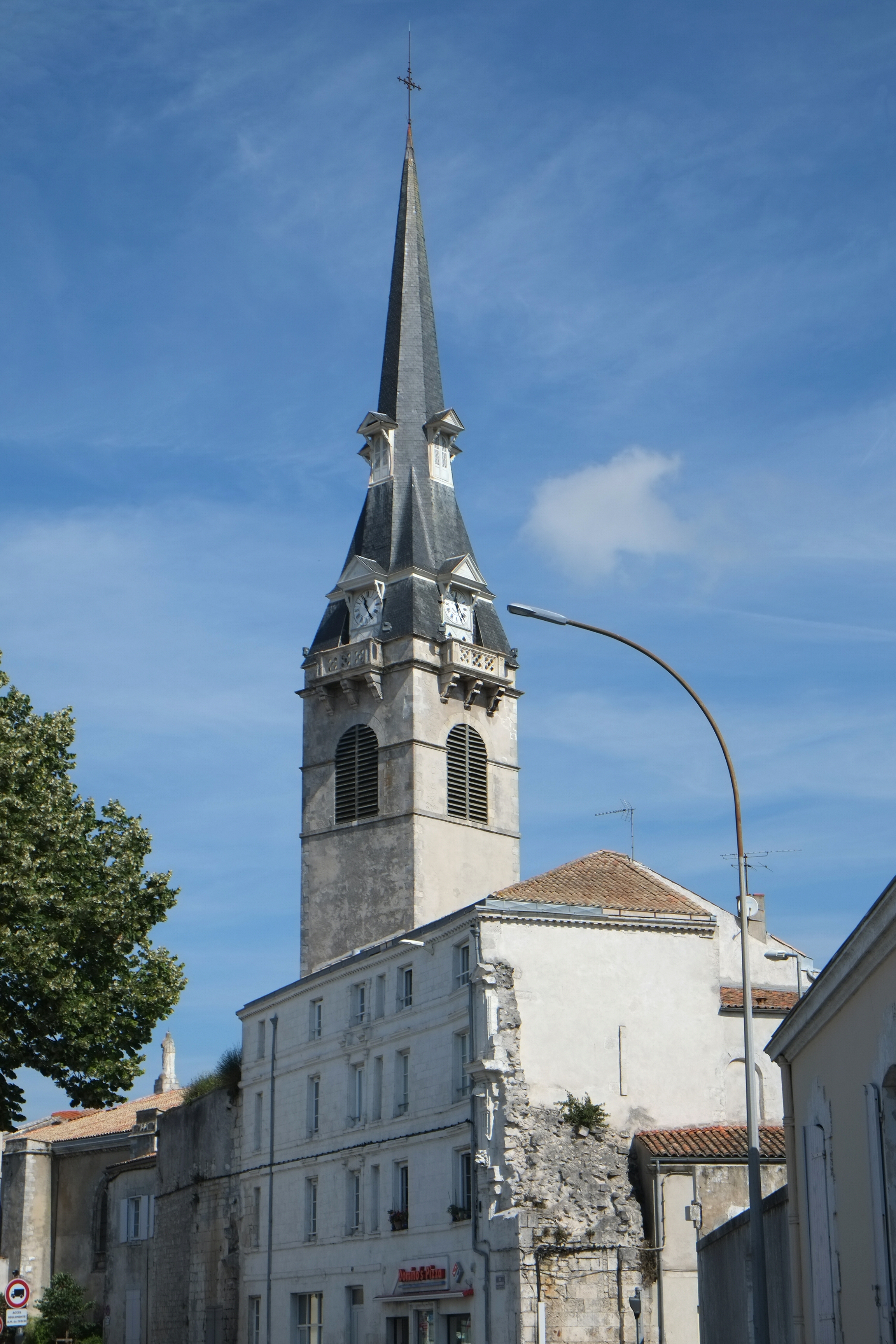 Clocher de l'église Notre-Dame-de-Cougnes La Rochelle Charente-Maritime France